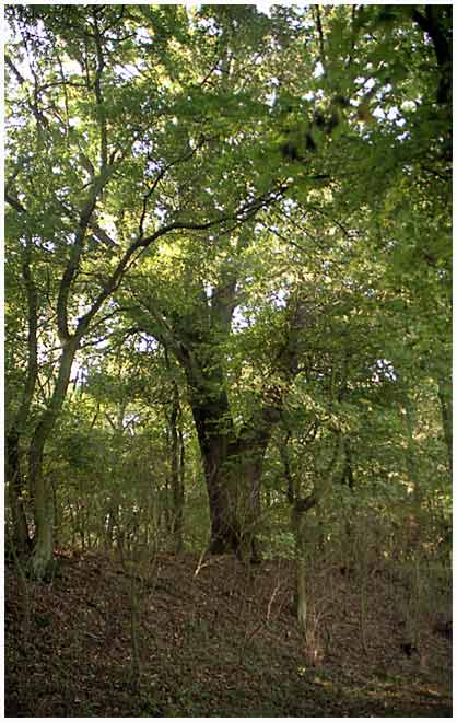 památné duby u Stýskalu